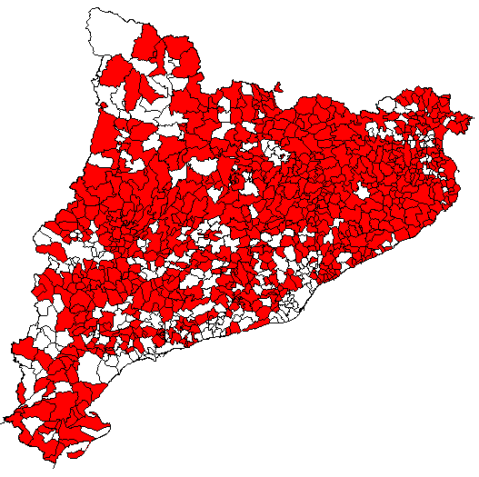 Mapa municipal del Principat de catalunya on figuren en vermell els municipis adherits a l'AMI.